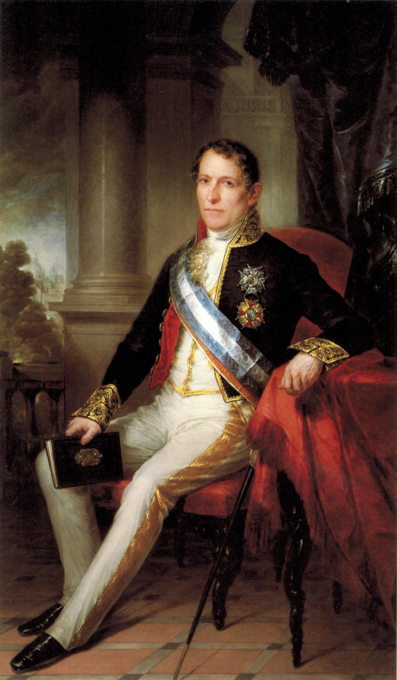 Retrato del militar, politico y economista español Ramón de Santillán (1791-1863). Gobernador del Banco de España de enero de 1856 a noviembre de 1863.